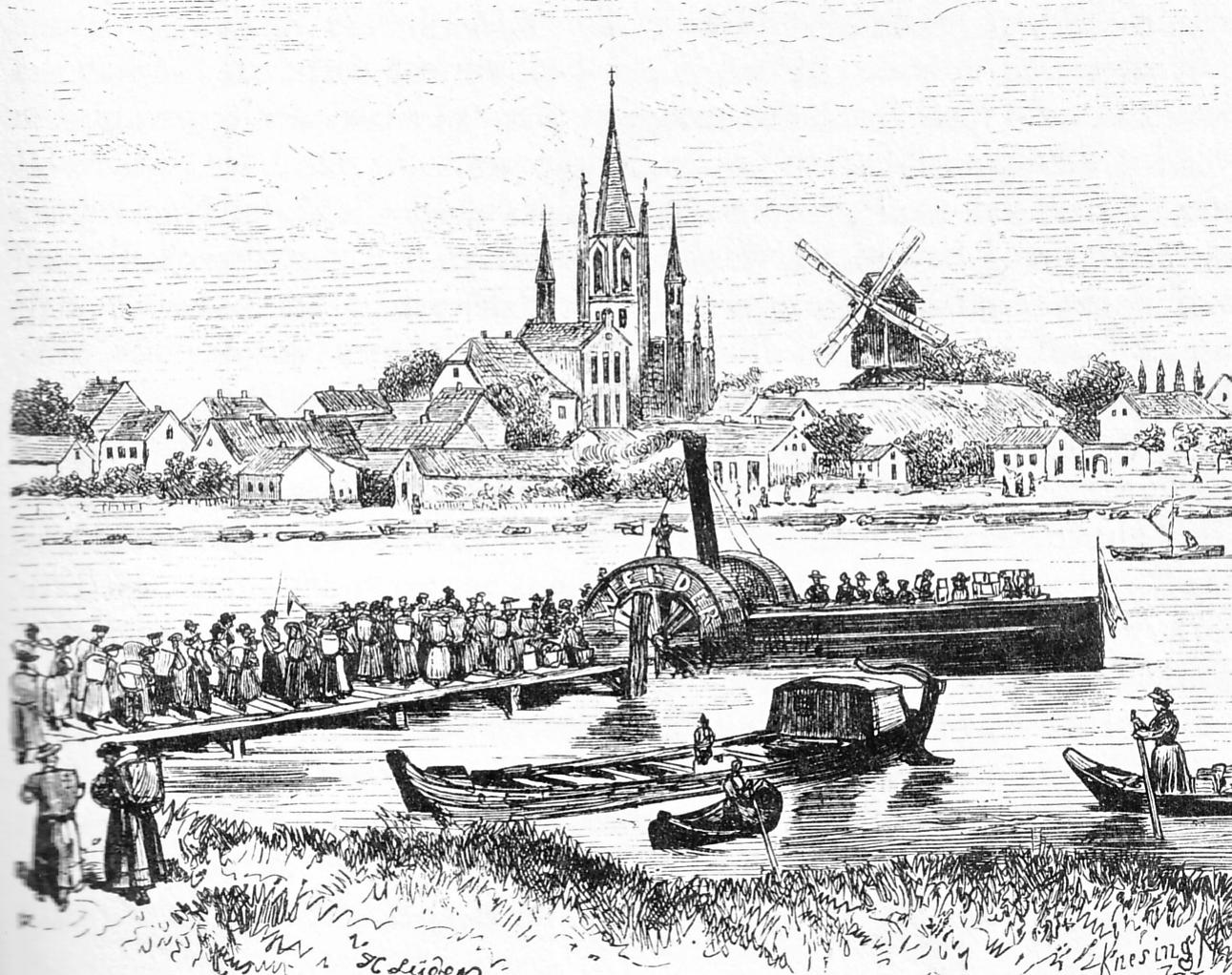 Lithographie: Abfahrt des Obstdampfers von Werder nach Berlin